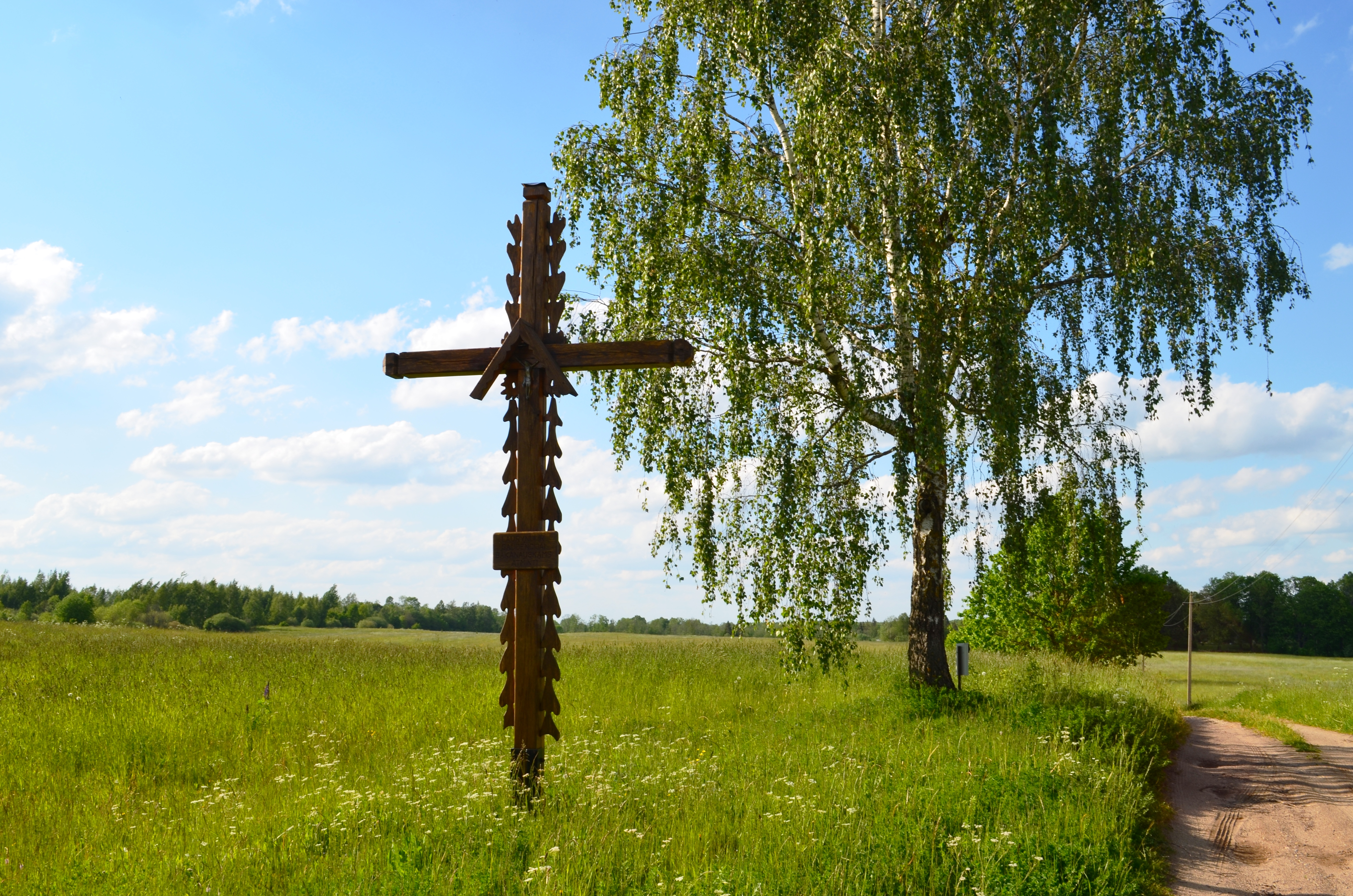 Paraudinės kryžius, Molėtų raj.